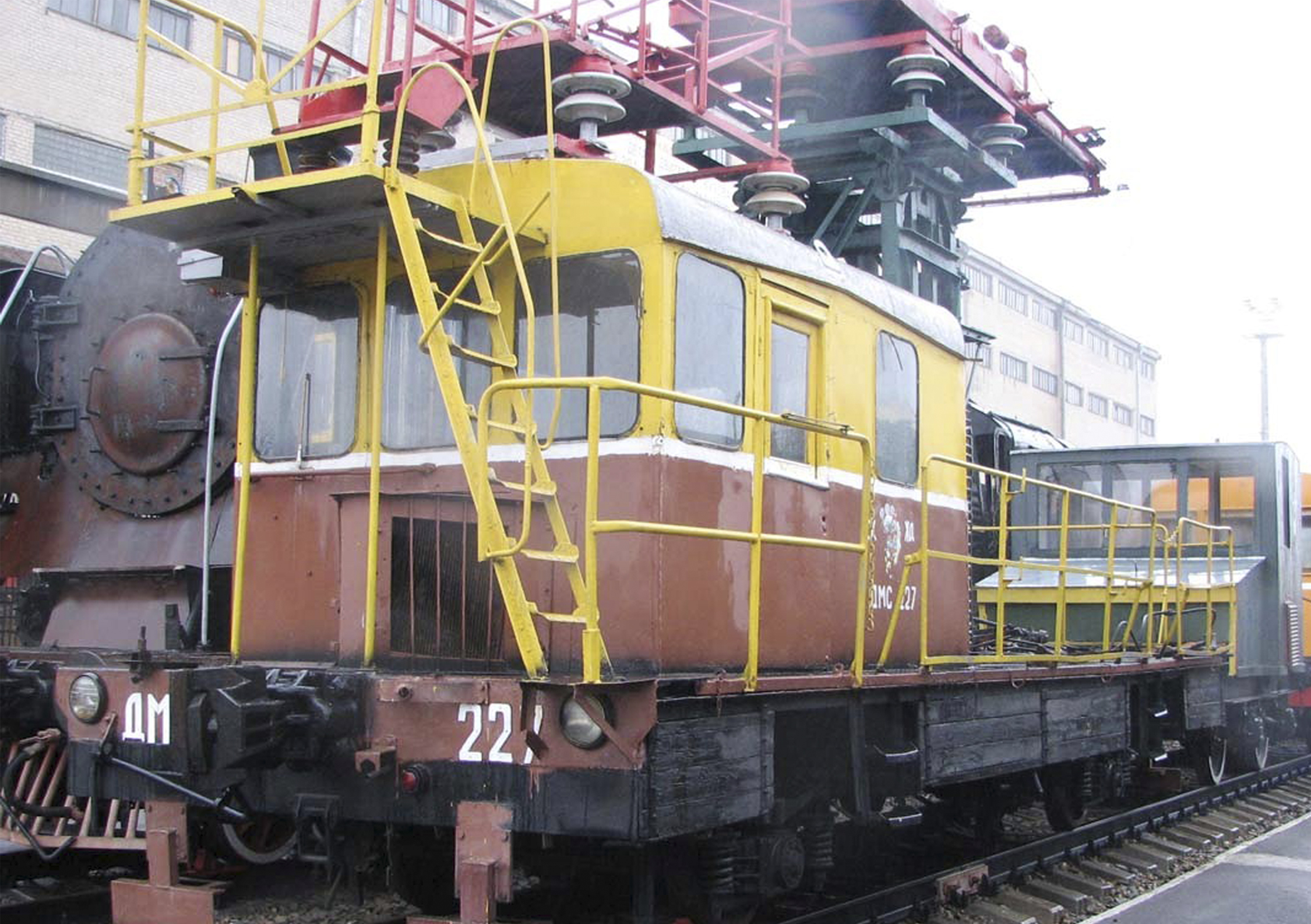 Автодрезина построена Пермским машиностроительным заводом в 1972 году